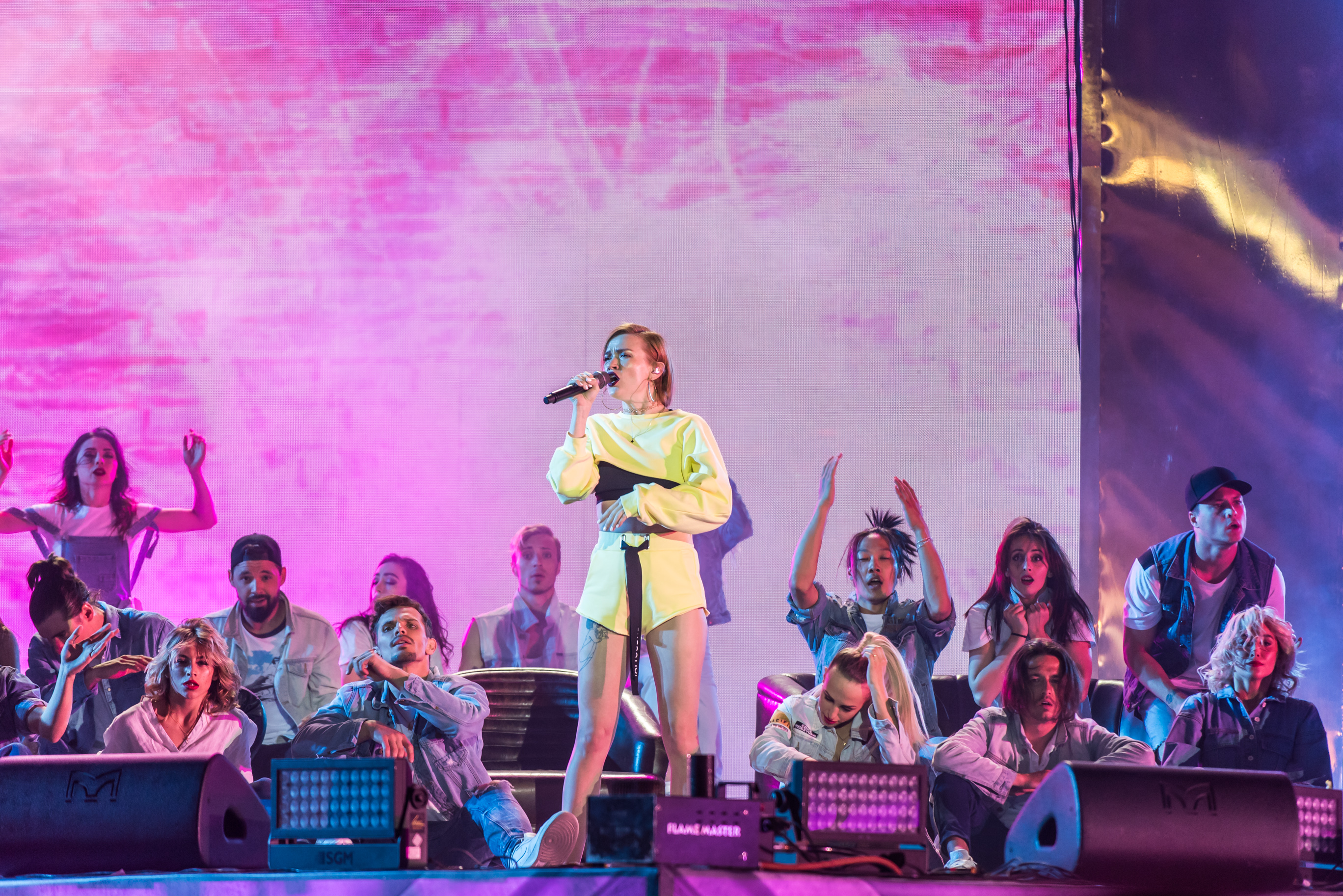 Моя Мишель на Алых парусах 2018